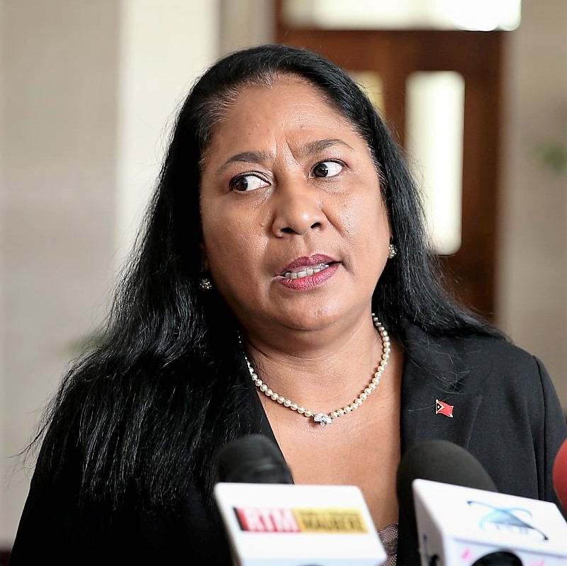 Maria da Paixão da Costa, osttimoresische Diplomatin